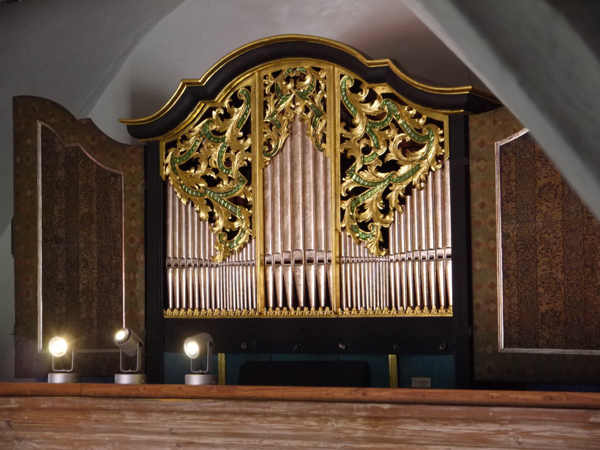 Orgel der Burgkapelle Lichtentanne-Schönfels, Sachsen, Deutschland